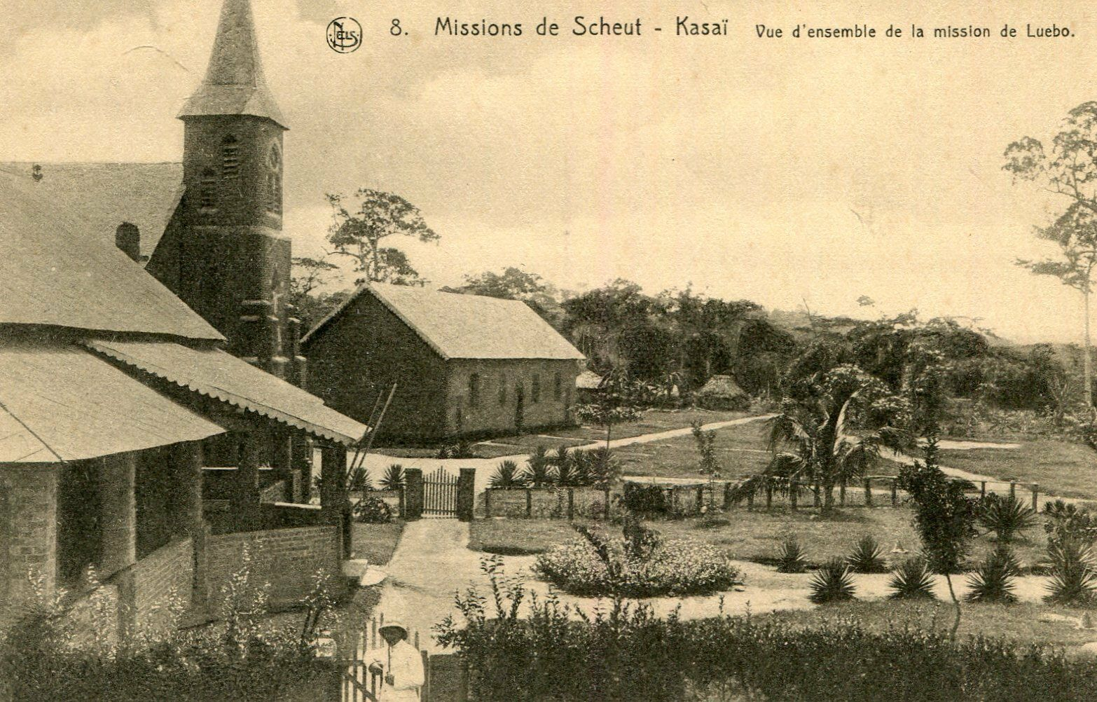 Mission de Luebo des pères scheutistes au Congo belge.